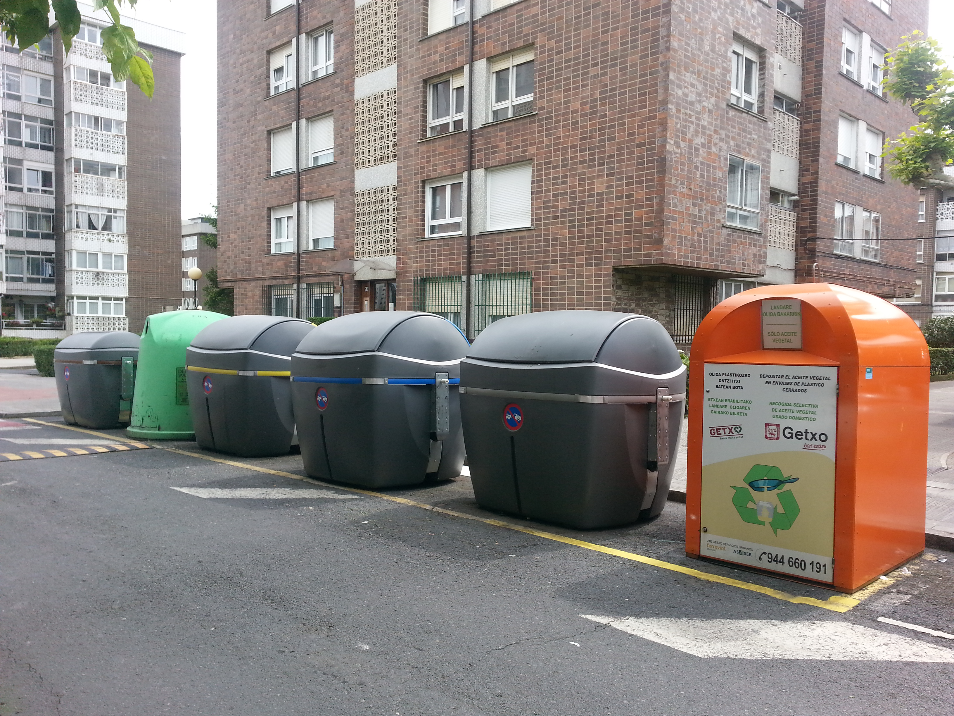 Birziklatzeko sei edukiontzi. Getxon. Zazpigarrena hauengandik 10 metrora (pilena).